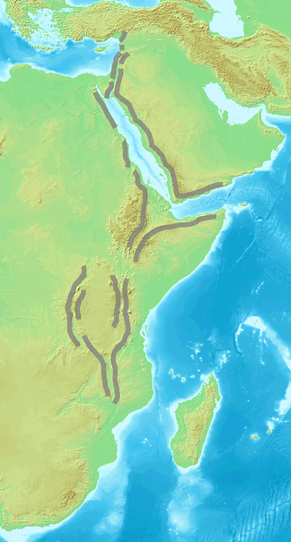 Carte des systèmes montagneux bordant la vallée du grand rift.